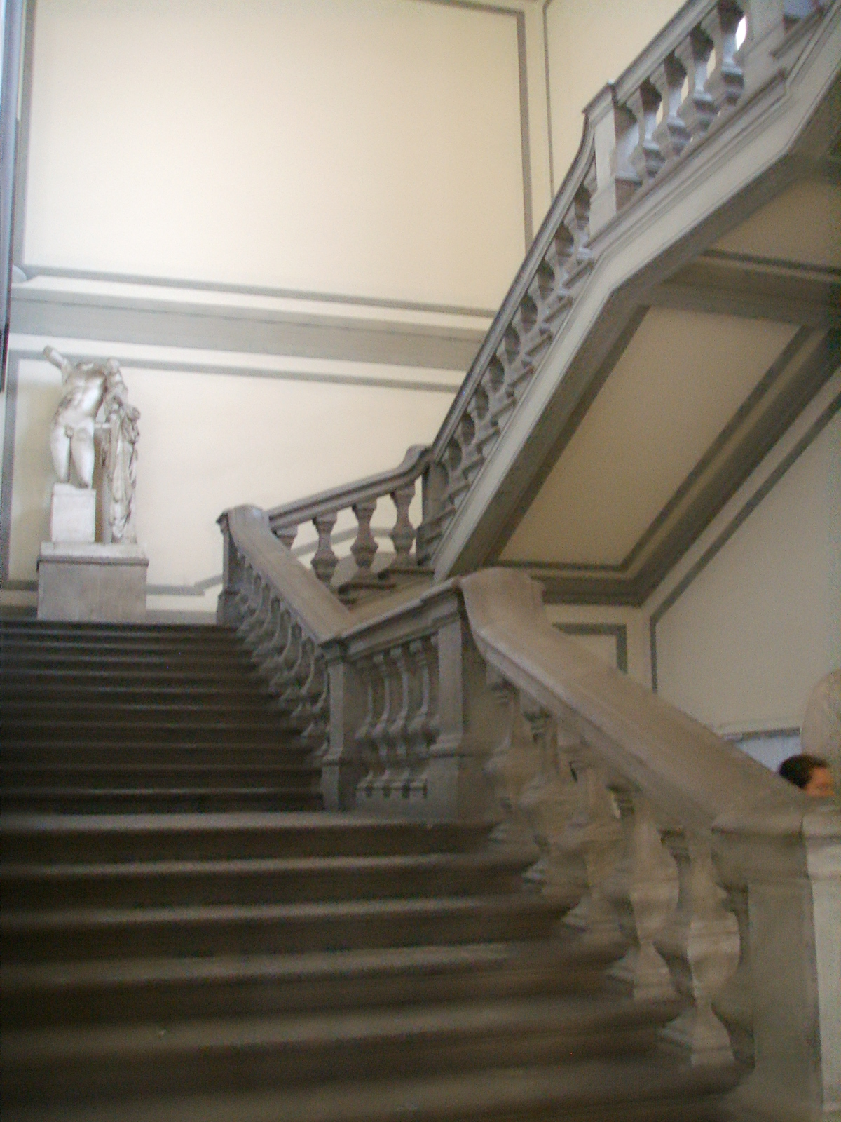 Accademia dei belle arti, scalinata